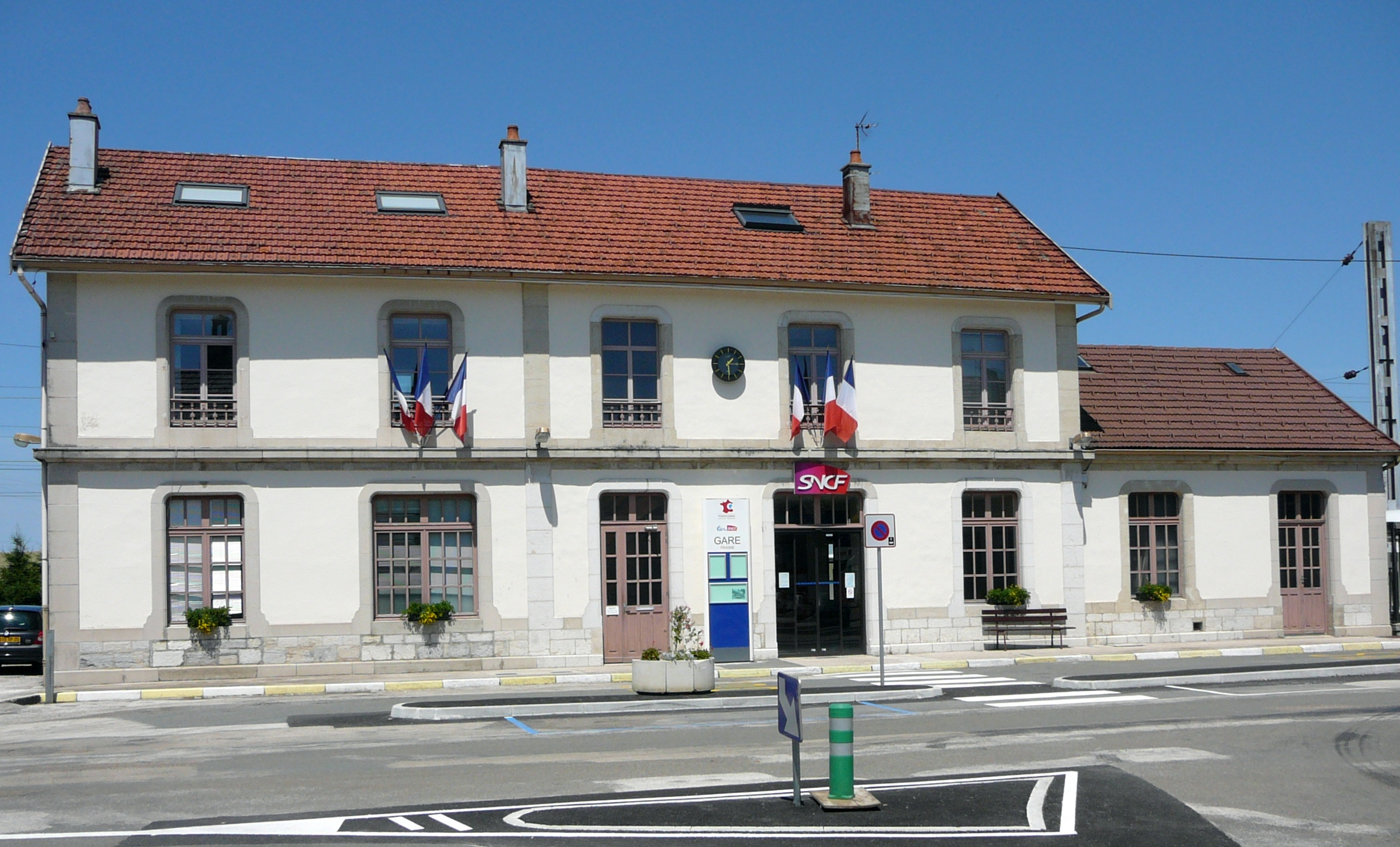 Gare SNCF de Frasne côté cour